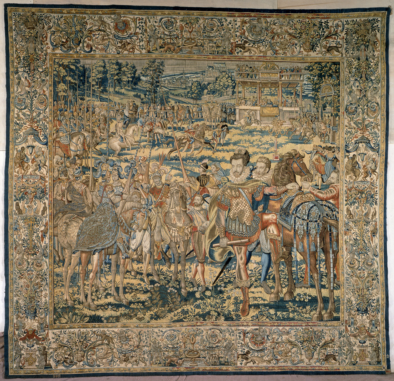 Tapisserie dite de « la quintaine », appartenant à la série des « tapisseries des Valois » conservées au musée des Offices de Florence. Au premier plan, à droite, figure le roi Henri III.